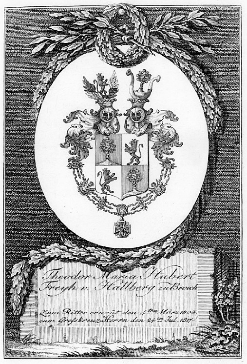 Theodor von Hallberg-Broich (1768-1862), deutscher Reisender und Schriftsteller, persönliches Wappen als bayerischer St. Michaelsritter